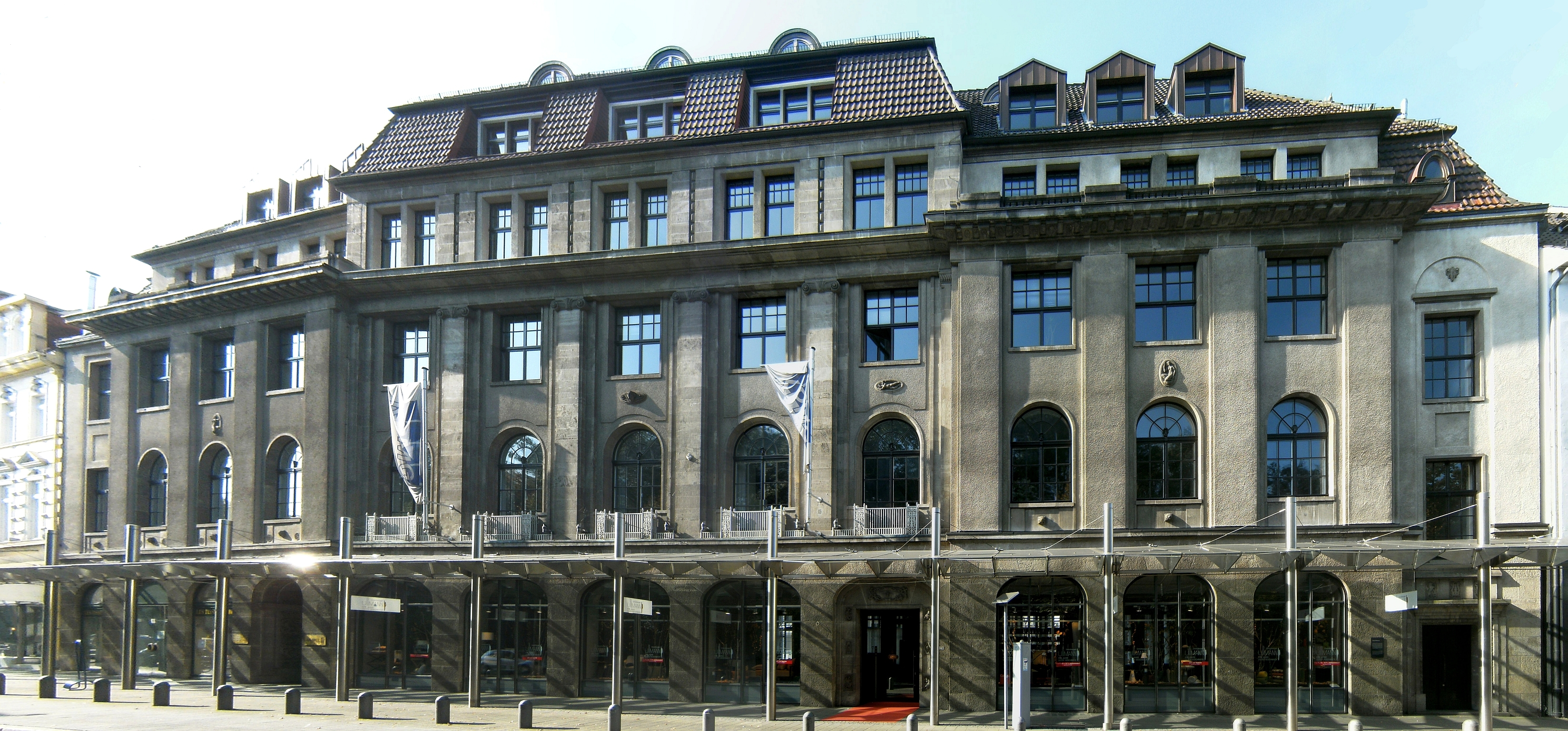 Geschäftshaus Stallmann und Harder in Bremen, Am Wall 175-177. Das abgebildete Objekt ist ein geschütztes Kulturdenkmal in der Freien Hansestadt Bremen, mit der Nr. 0082 beim Landesamt für Denkmalpflege registriert.